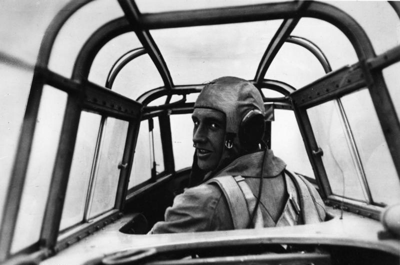 Pilot einer Me 110 Der Flugzeugführer PK-Wundshammer-Scherl Bilderdienst 4515-40 Mai 1940 "Fr" OLF [Pilot eines Flugzeugs Messerschmitt Me 110 in Kanzel sitzend]